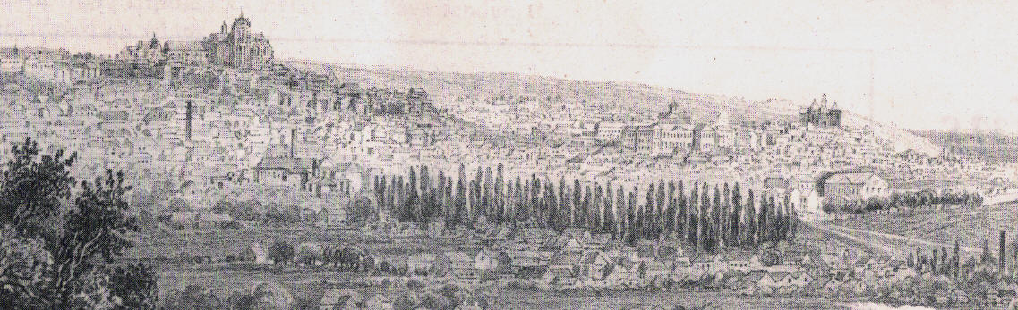 Le nord-ouest de la ville du Mans après l'arrivée du chemin de fer, vers 1860.